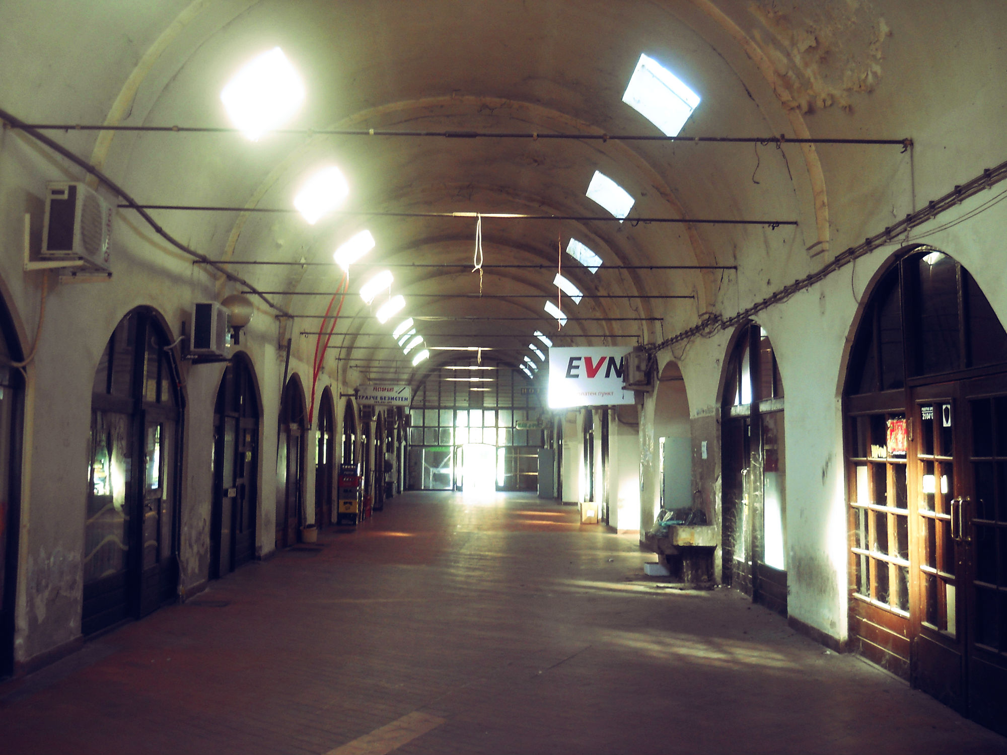 Безистен - покриена чаршија од времето на Османлиската Империја во Битола